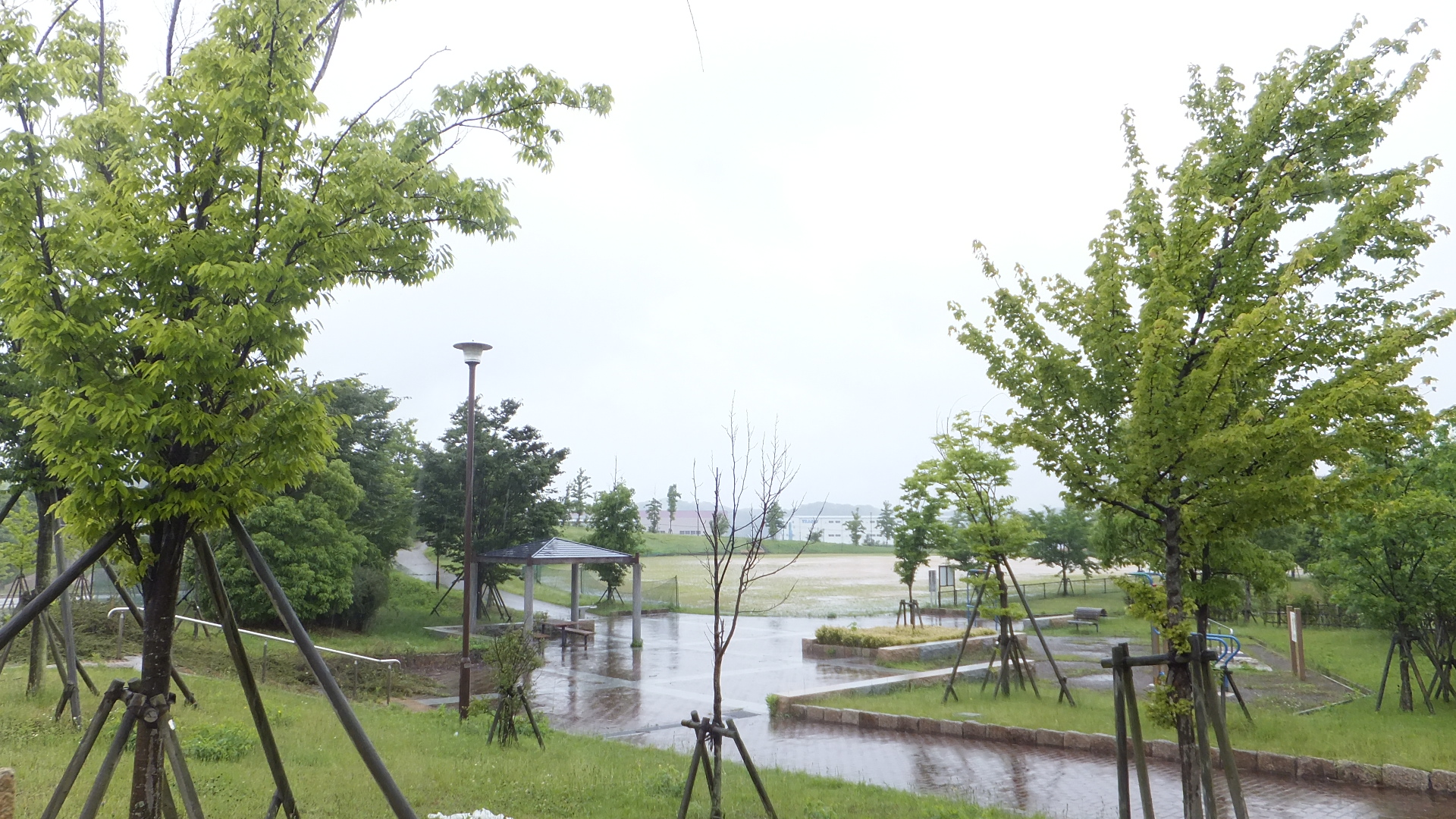 木見中央公園